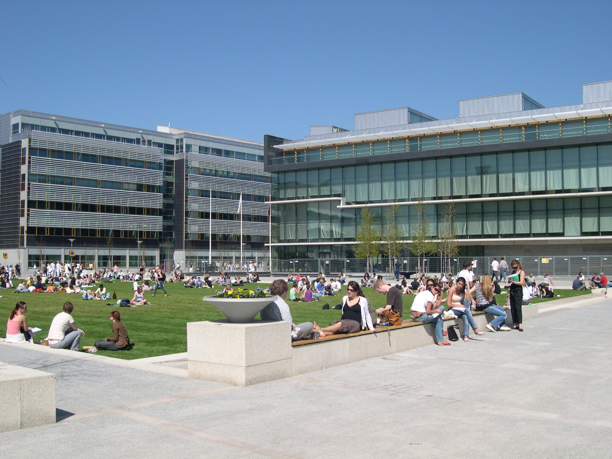 Södertörns högskolas bibliotek, baksidan